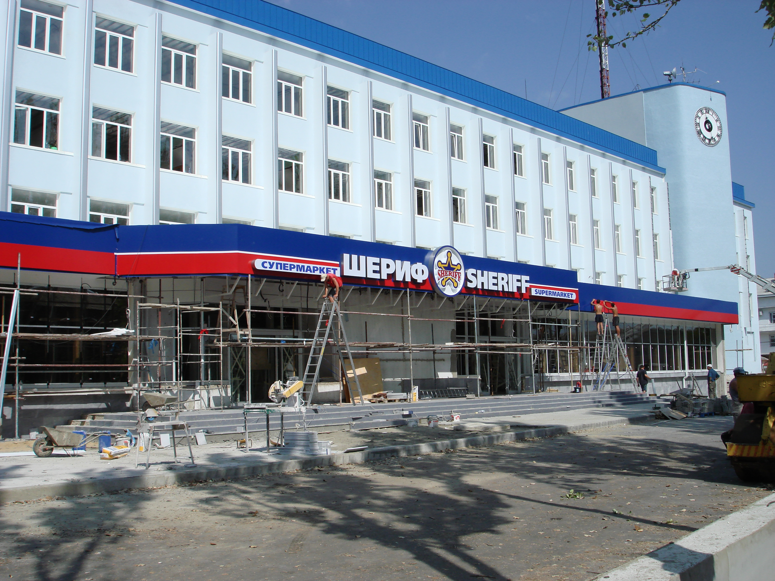 Строящийся супермаркет "Шериф" в центре Бендер